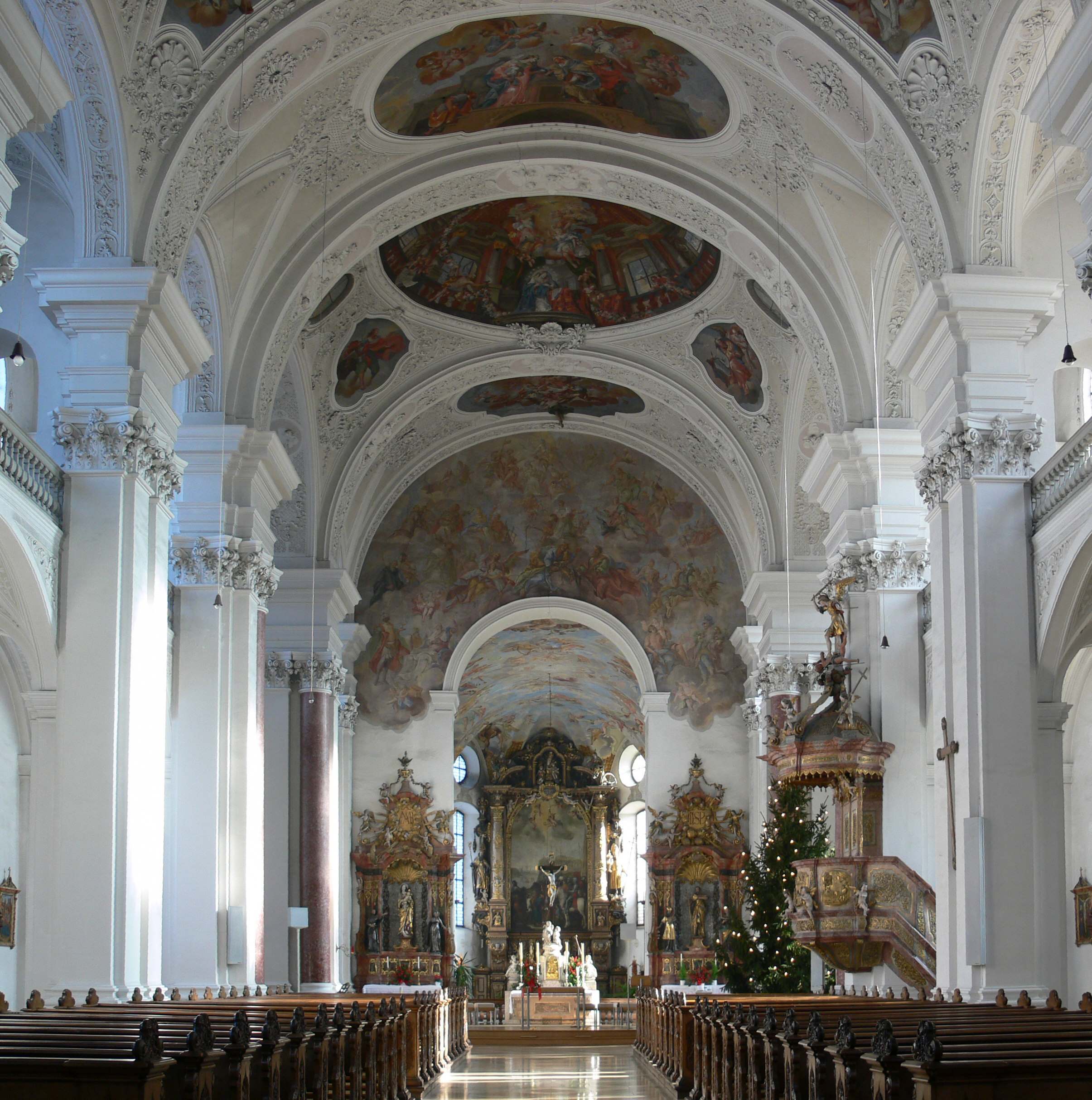 Ravensburg, ehem. Klosterkirche Weißenau, Blick nach Osten